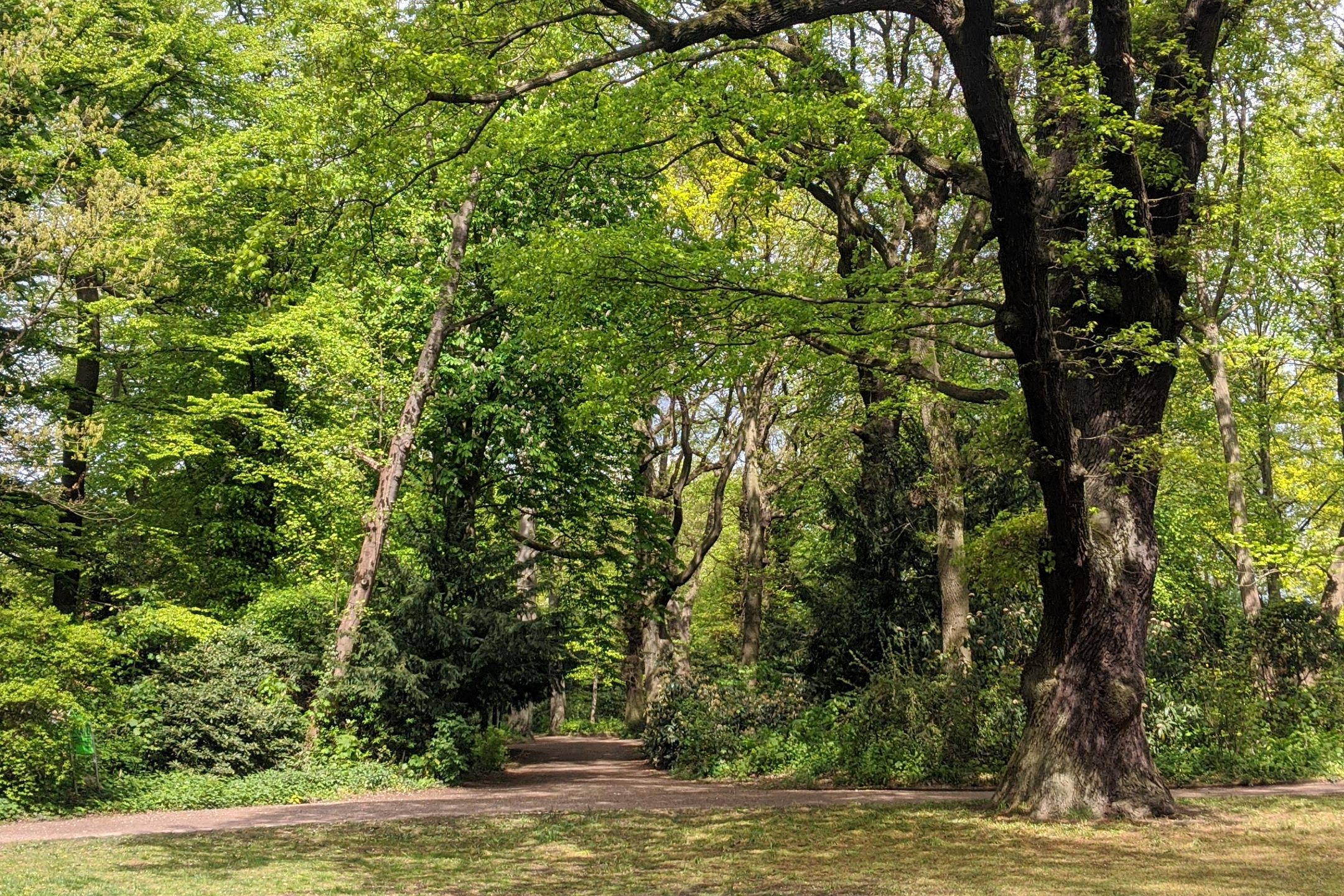 Hammer Park in Hamburg-Hamm, Frühjahr 2020